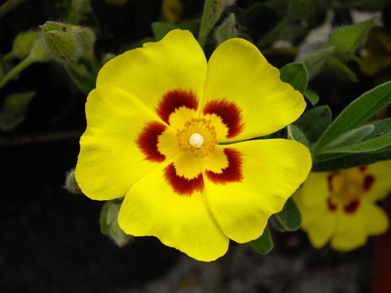 Halimiun lasianthum